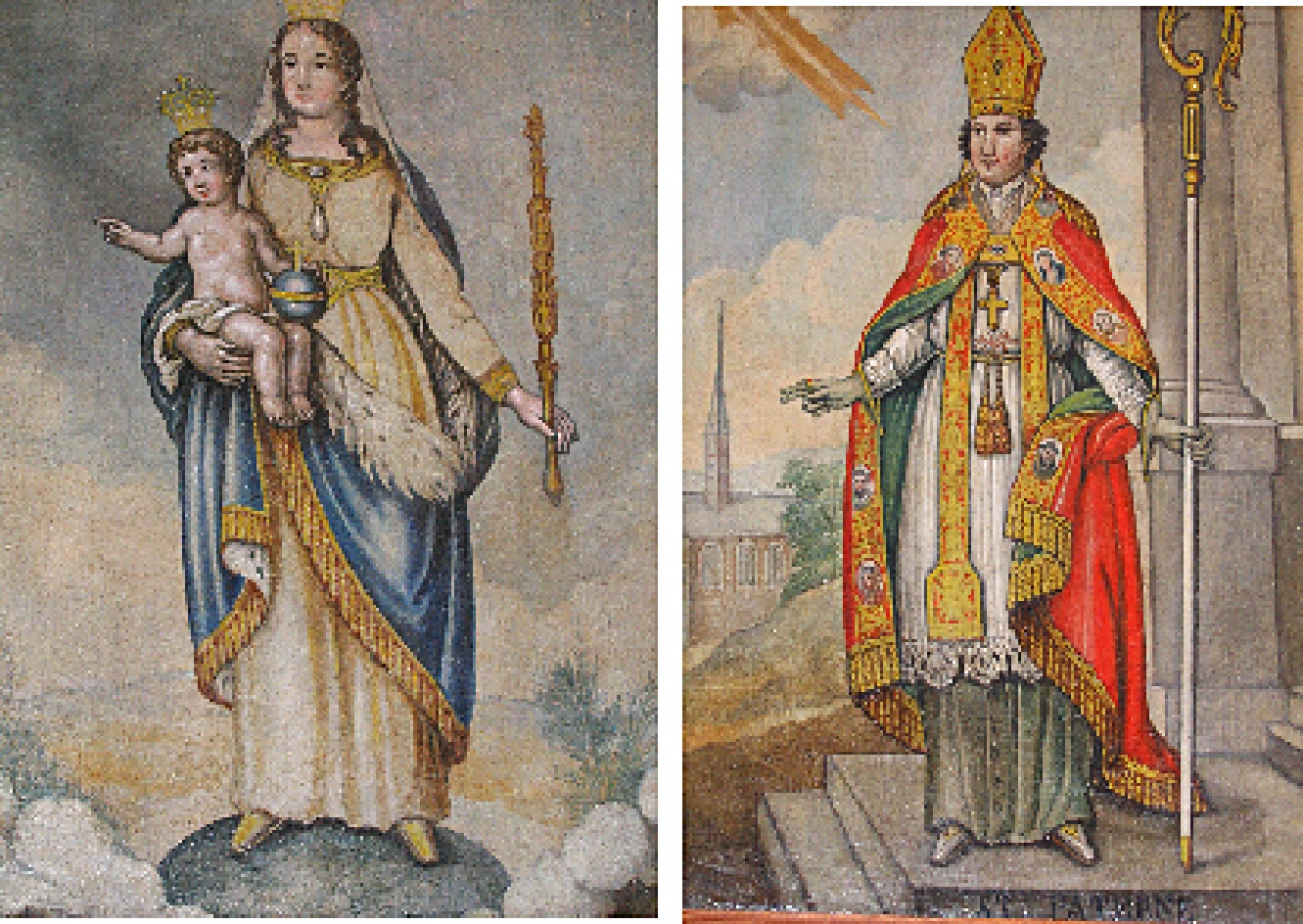 Bannière double face découverte dans la sacristie et représentant St Paterne et une Vierge à l'enfant en majesté